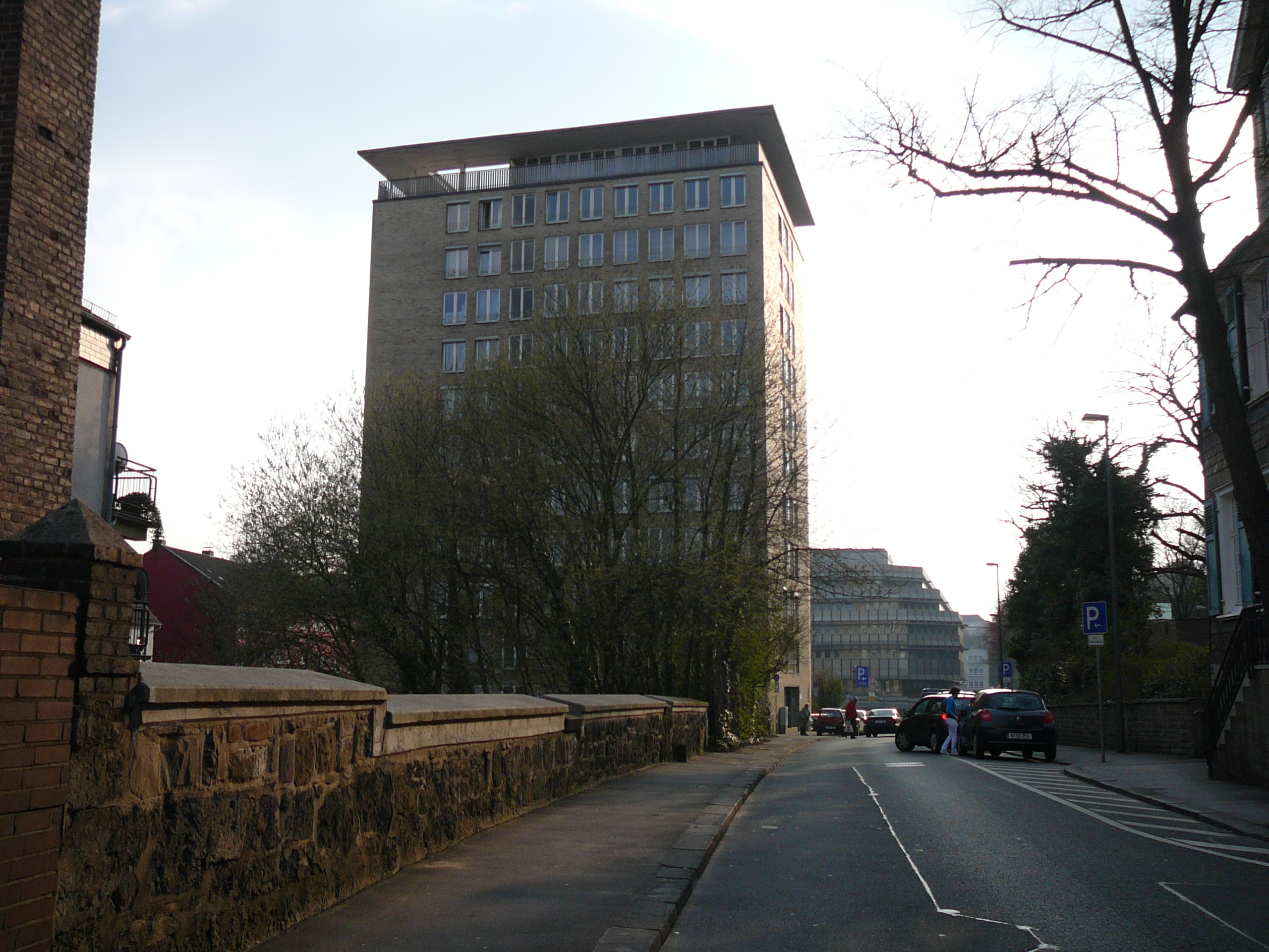 Mühlenweg, Wuppertal-Barmen